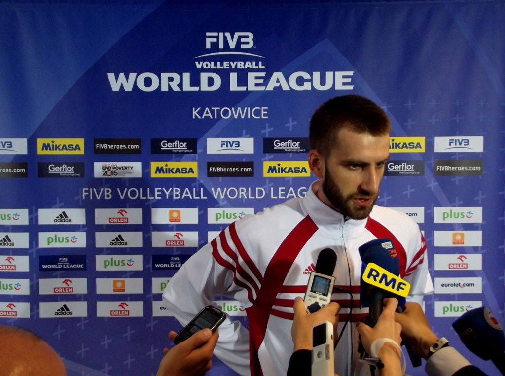 Zdjęcie zrobione podczas zawodów Ligi Światowej 2012 w katowickim Spodku.